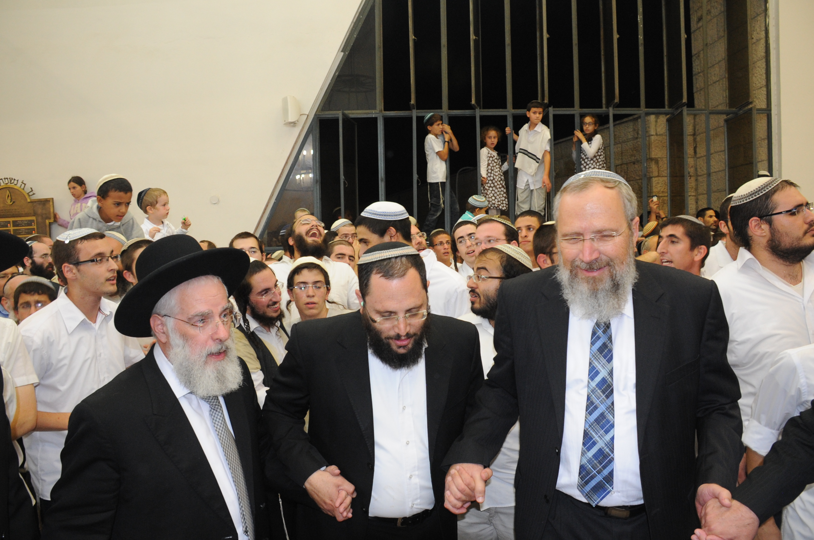 הרב אישון יחד עם הרב יעקב שפירא והרב סילבצקי